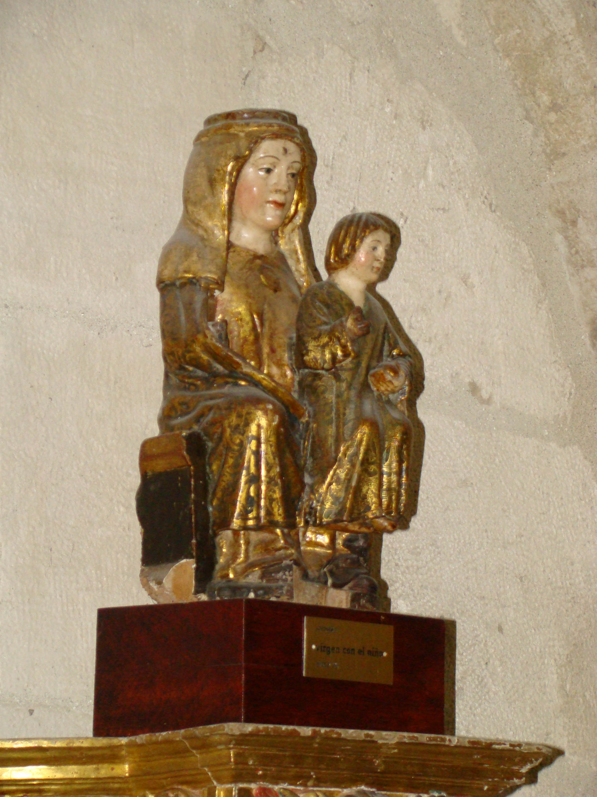 Virgen con Niño o Sedes sapientiae (Trono de la Sabiduría), de estilo románico. Se encuentra en el Museo Catedralicio de Valladolid. Autor anónimo.